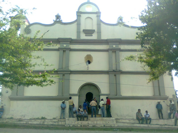 Iglesia Catolica Frente La Plaza Central del Pueblo